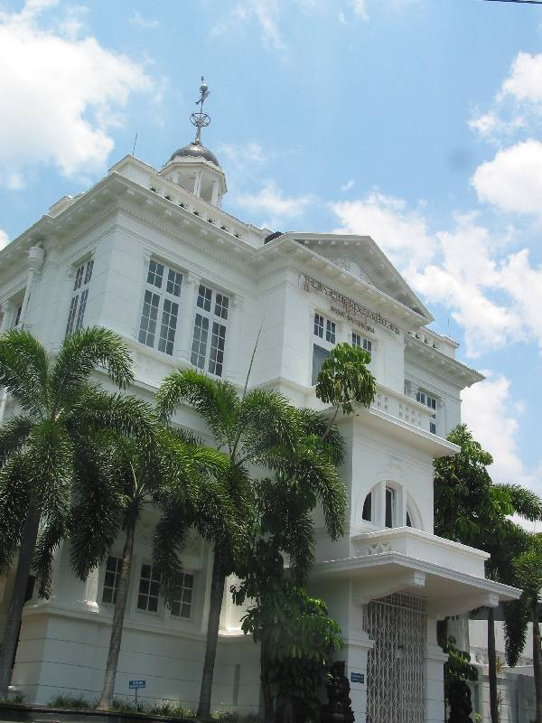 Bank of Indonesia Surakarta